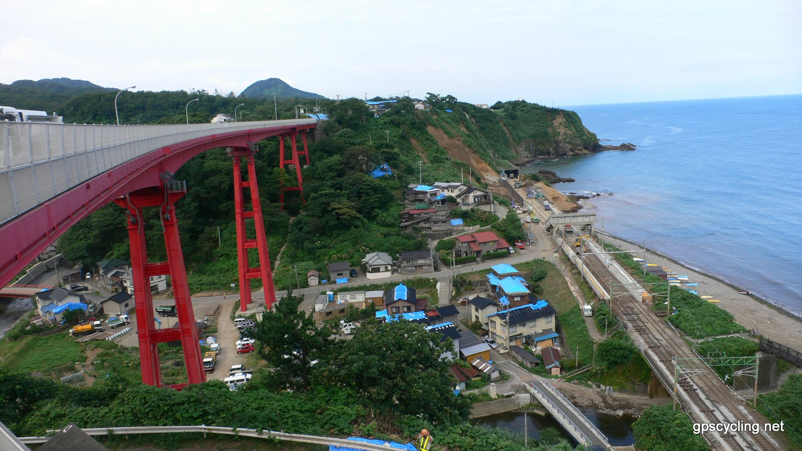 青海川駅と米山大橋